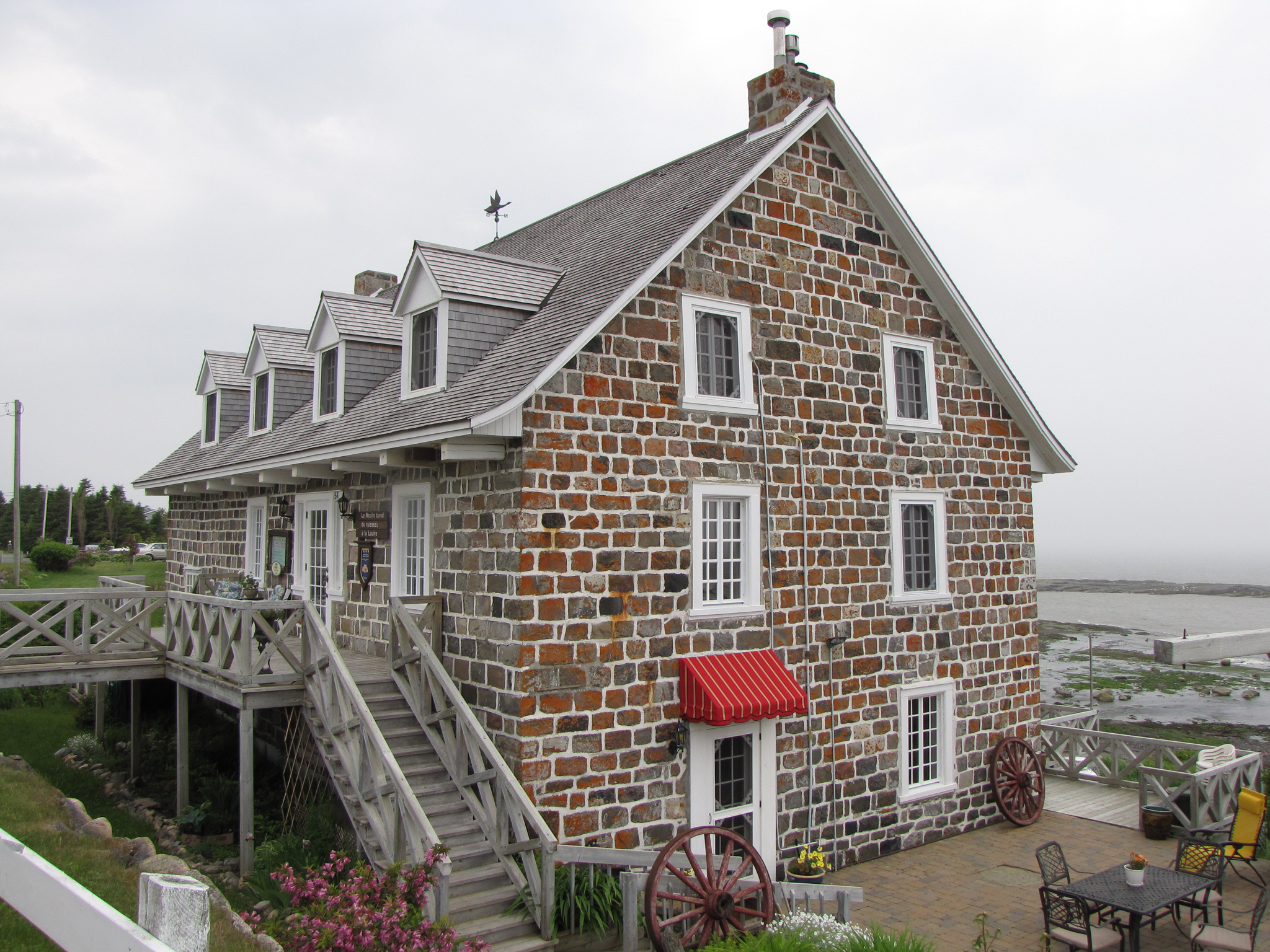 Moulin banal du ruisseau à la Loutre, situé à Sainte-Luce (Bas-Saint-Laurent, Québec). Tous les mécanismes ont été défaits pour y aménager une résidence. Actuellement, il sert de centre de formation et de gîte touristique. Moulin à eau; moulin à farine.